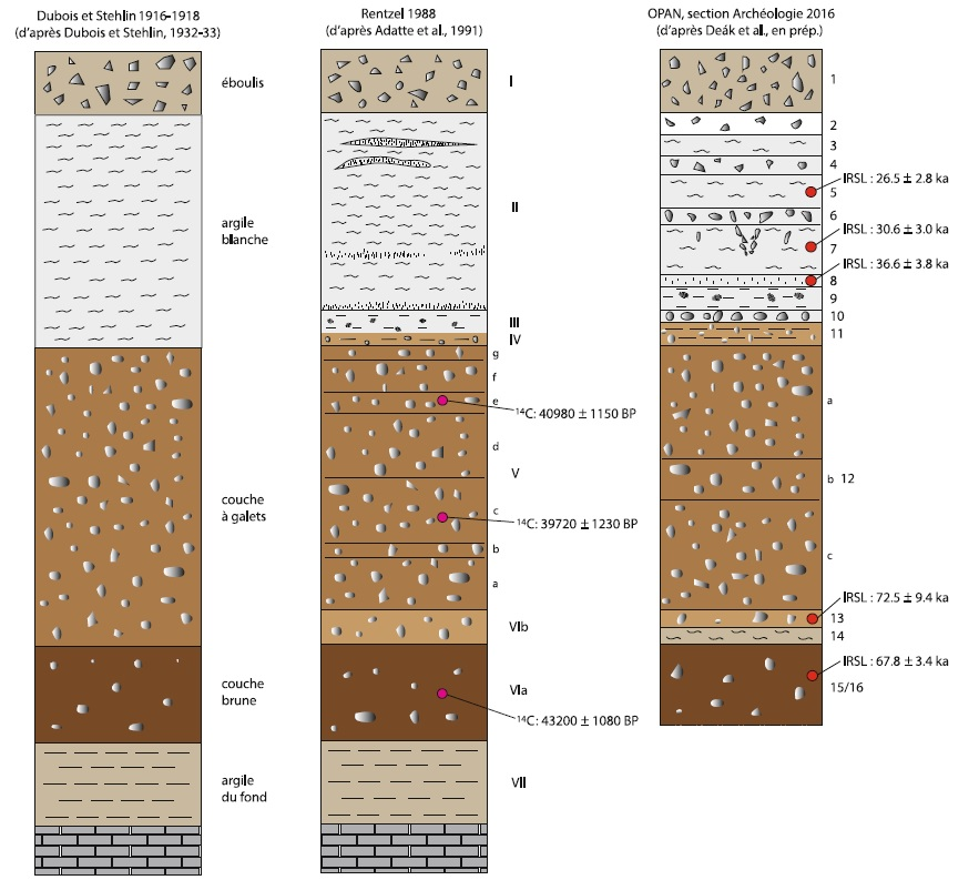 Les différentes interprétation de la stratigraphie de la grotte de Cotencher au cours des différentes fouilles.